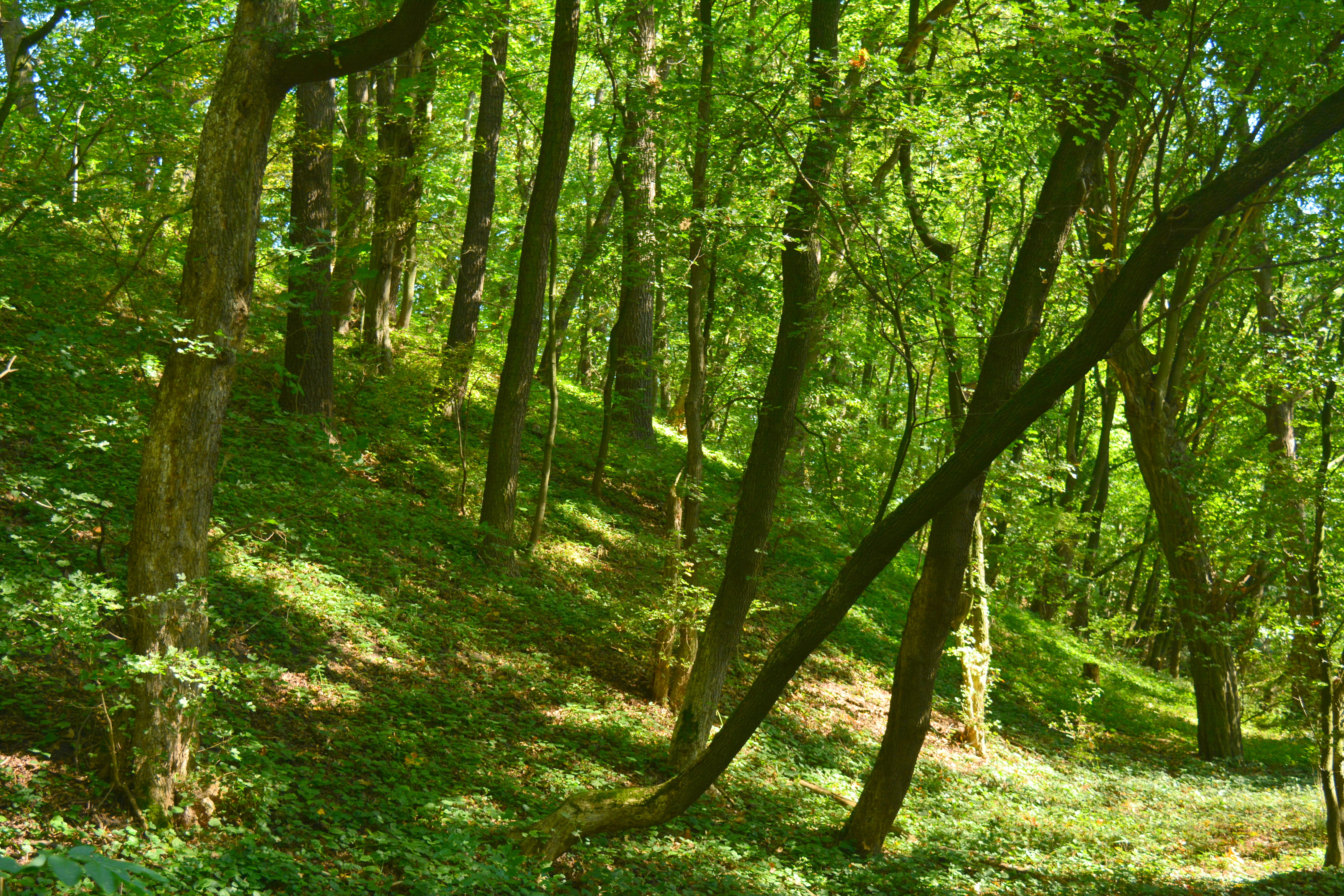 Stráň 29.9.2017